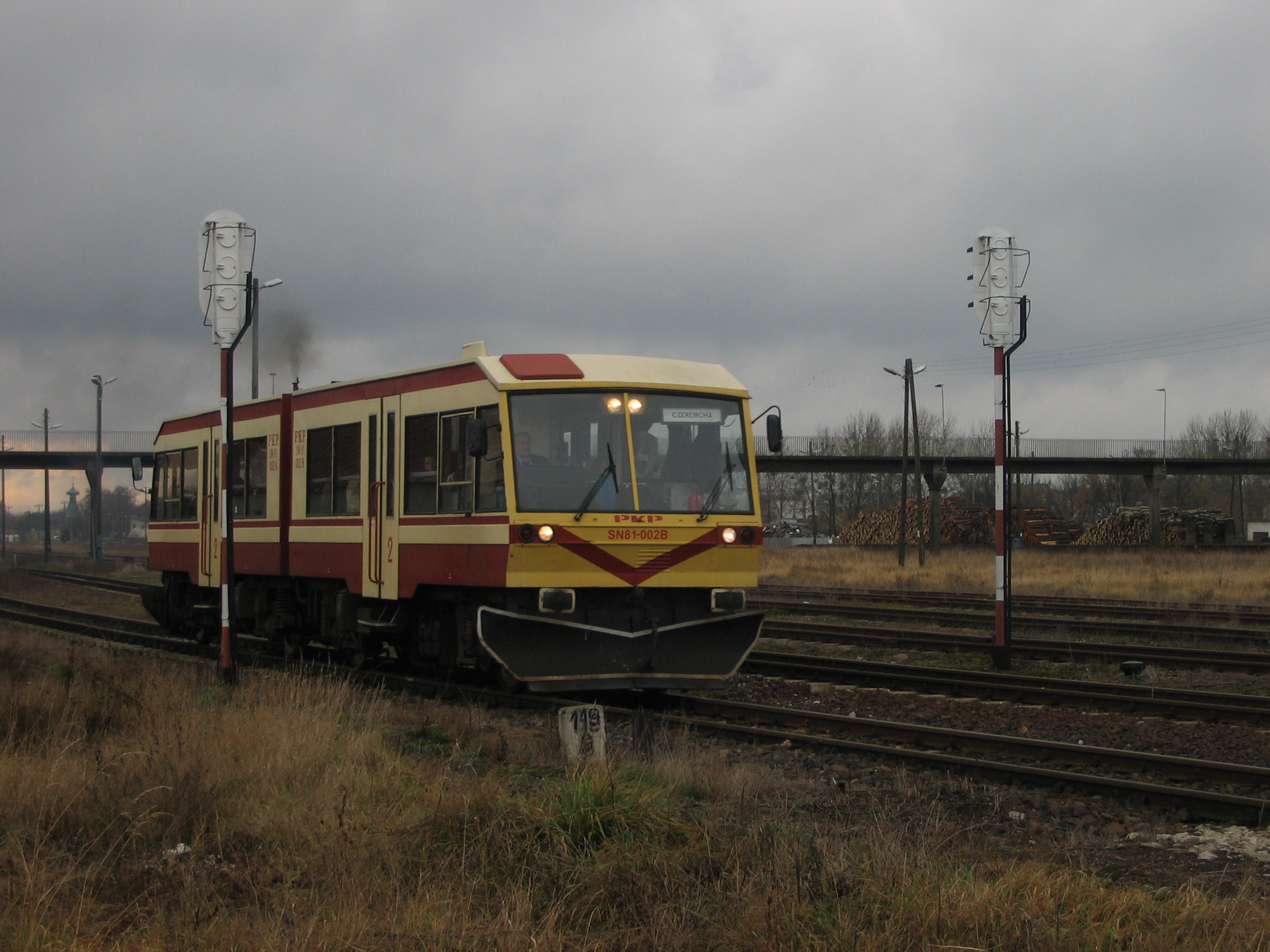 autobus szynowy SN81-002 jako pociąg osobowy nr 88632 relacji Hajnówka-Czeremcha (odjazd z Hajnówki 13:08 mija semafory wyjazdowe stacji Hajnówka (km. 119,9 linii nr 31)